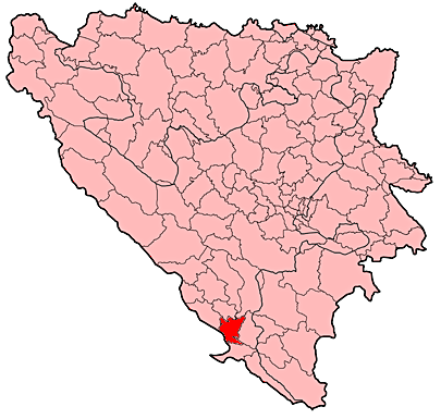 Prikaz općine Čapljina u Bosni i Hercegovini